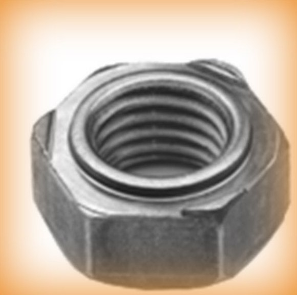 Sechskant-Schweißmutter DIN 929